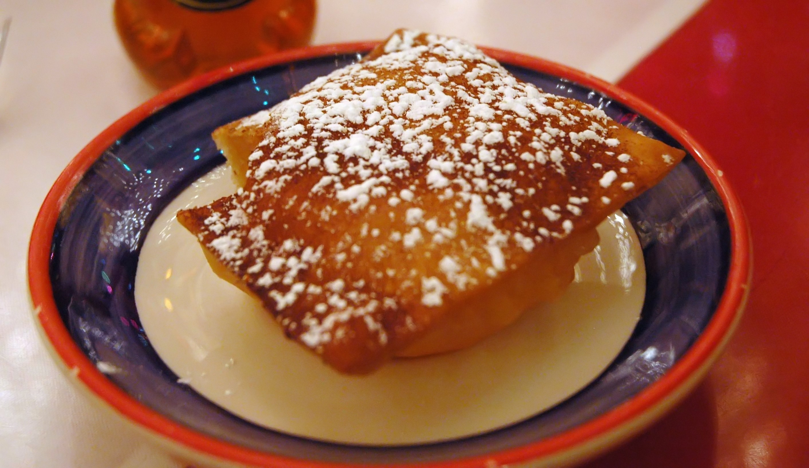 a sopaipilla